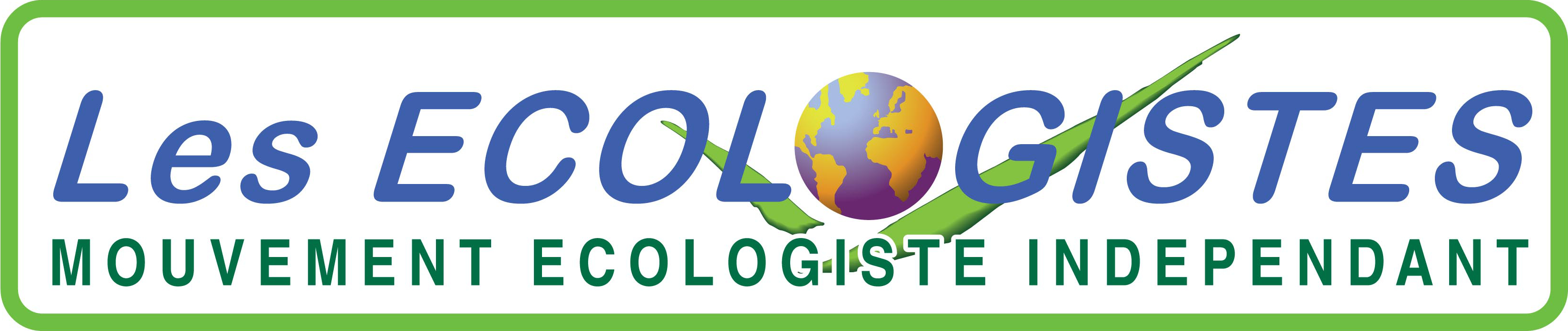 Logo officiel du parti "Les Ecologistes - Mouvement Ecologiste Indépendant"